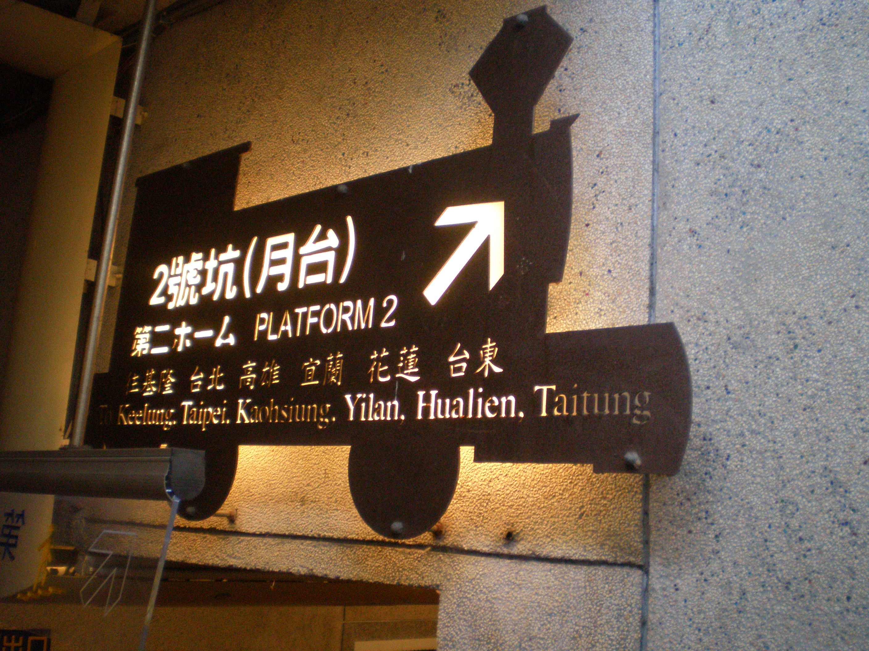 中文（台灣）: 臺灣鐵路管理局瑞芳車站地下道，往第二月台出口指示牌。